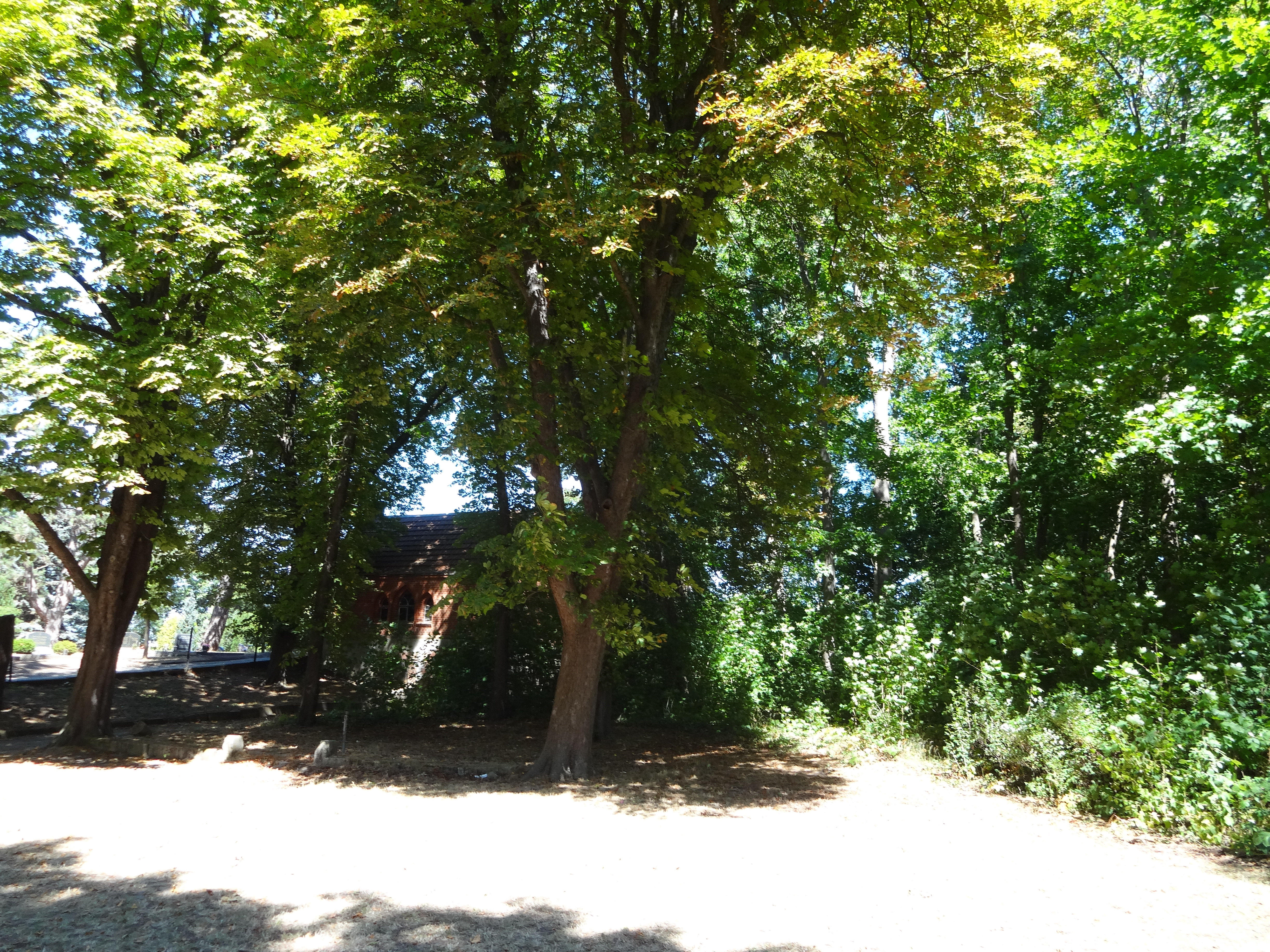 denkmalgeschützter Park auf dem Rendelberg in Dedeleben